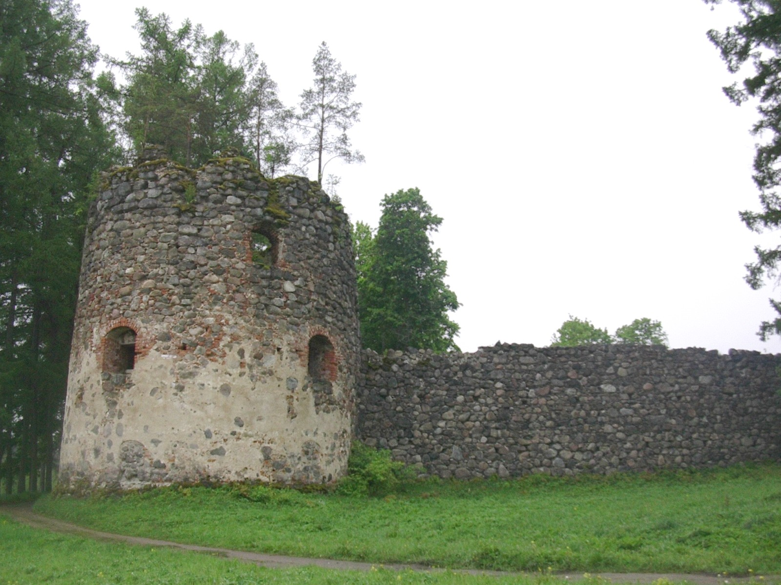 Härgmäe ordulinnuse kirdenurga suurtükitorn.